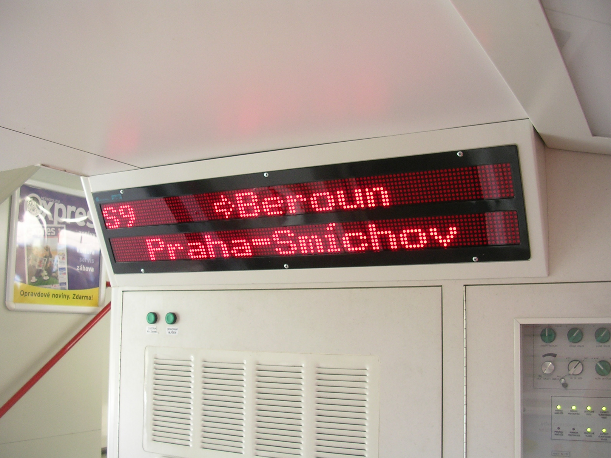 Vnitřní informační panel ve vlaku řady 971/471/071 na trati Praha-Beroun